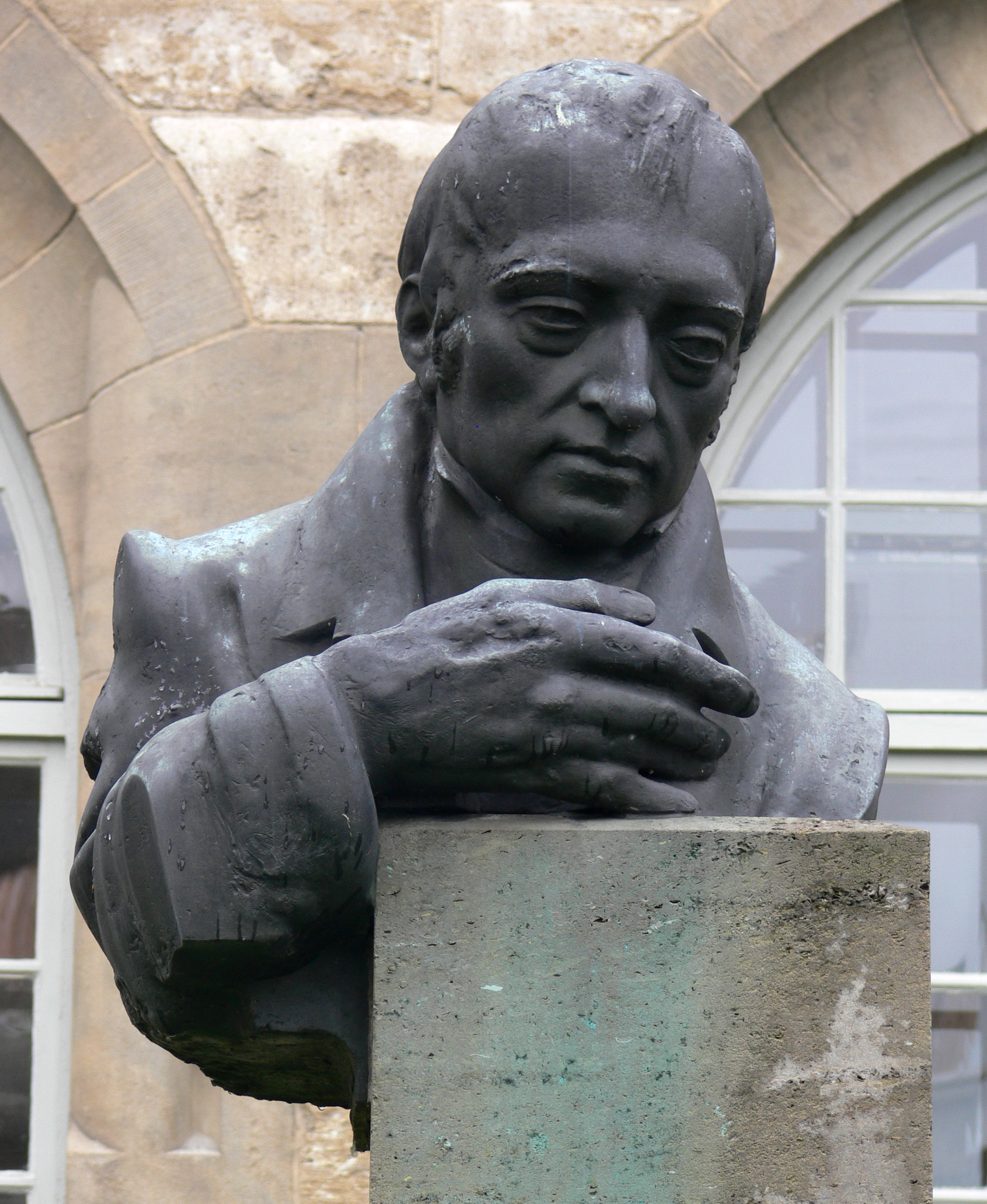 Jena: Denkmal Georg Wilhelm Friedrich Hegel vor dem Universitätshauptgebäude